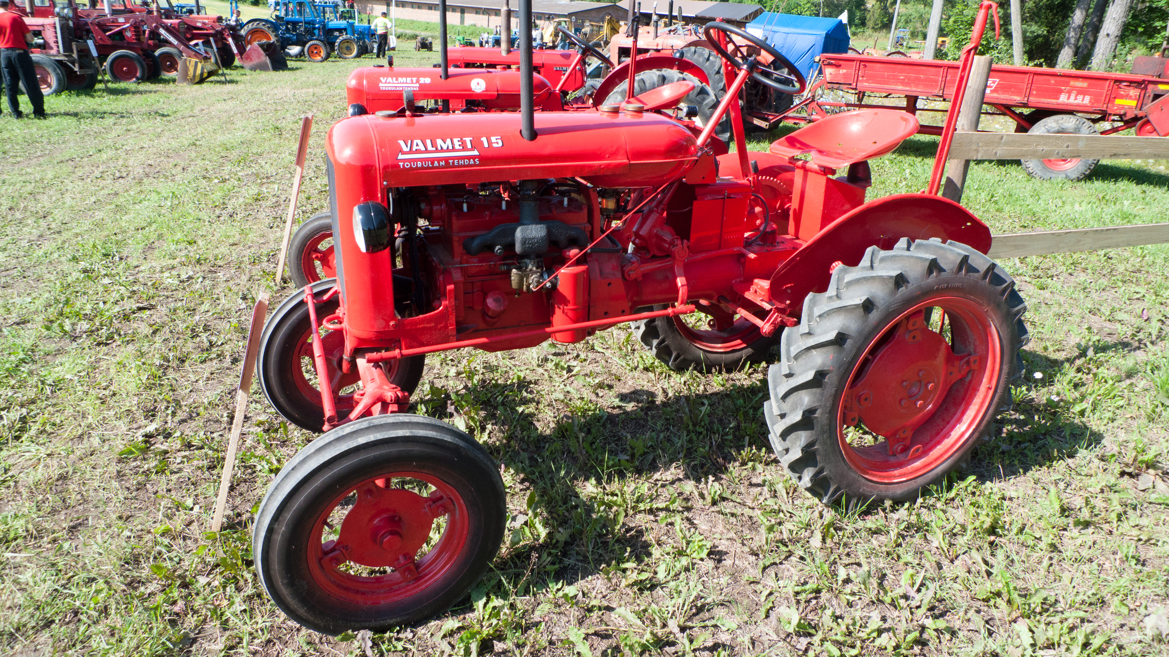 Valmet 15 traktori